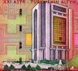 10 manat. Türkmenistan